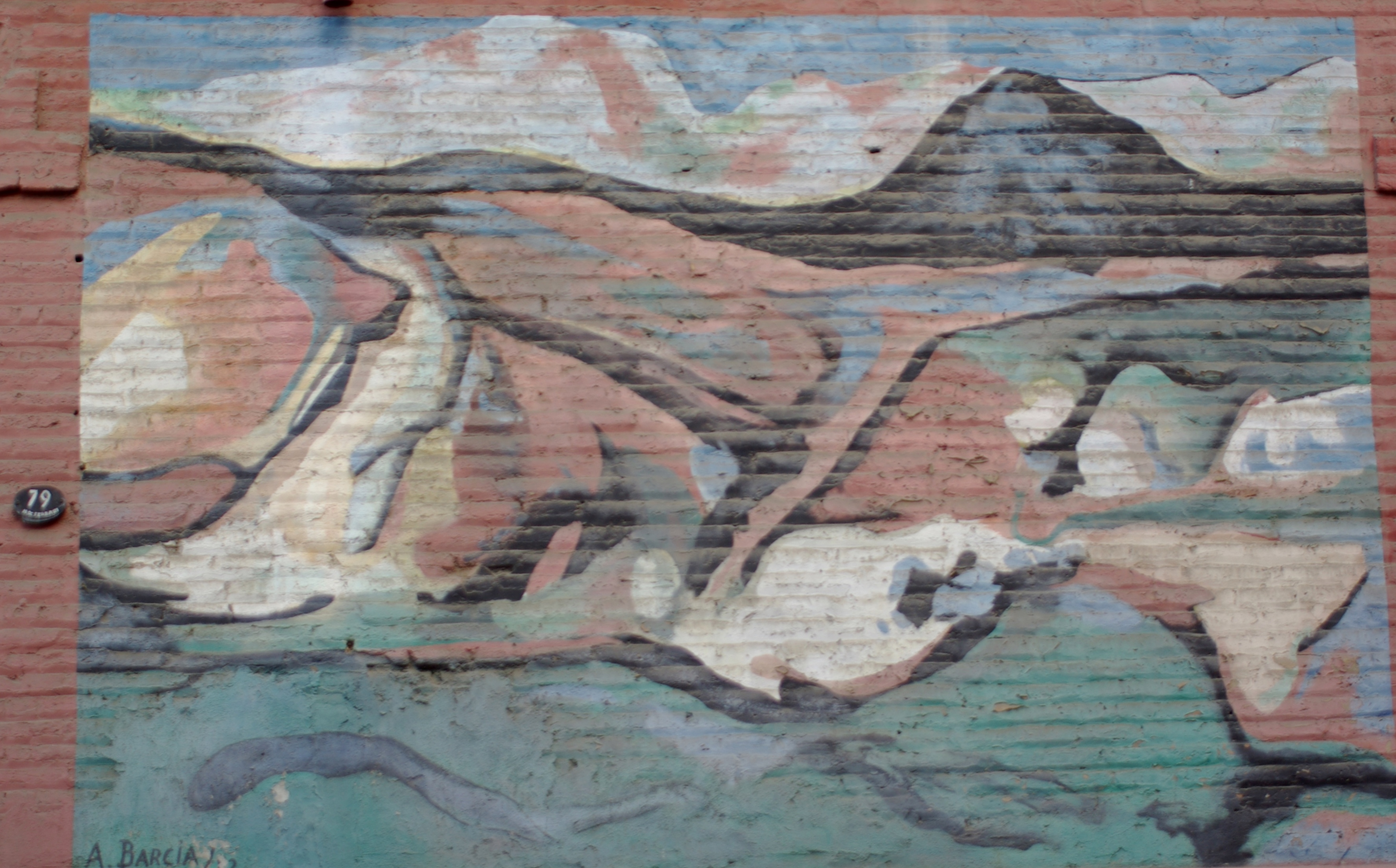 Mural nº19 del Museo a Cielo Abierto de Valparaíso, titulado Torbellino, de Augusto Barcia, cale Ricardo de Ferrari, cerro Bellavista